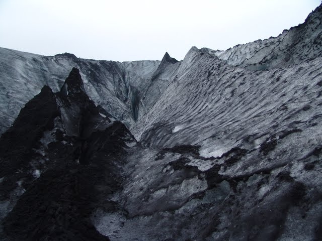 Ледник в пепле после недавнего извержения вулкана Эйяфьядлайёкюдль.